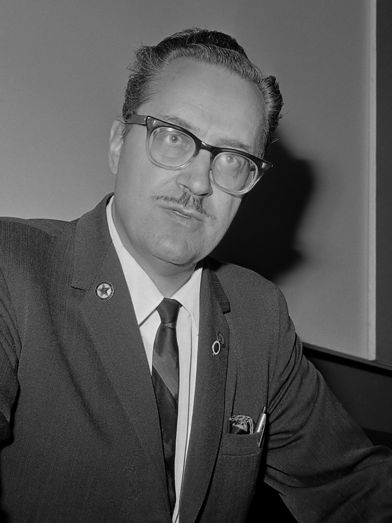 Forrest J. Ackerman, literair agent van science-fiction en horrorschrijvers 11 augustus 1965